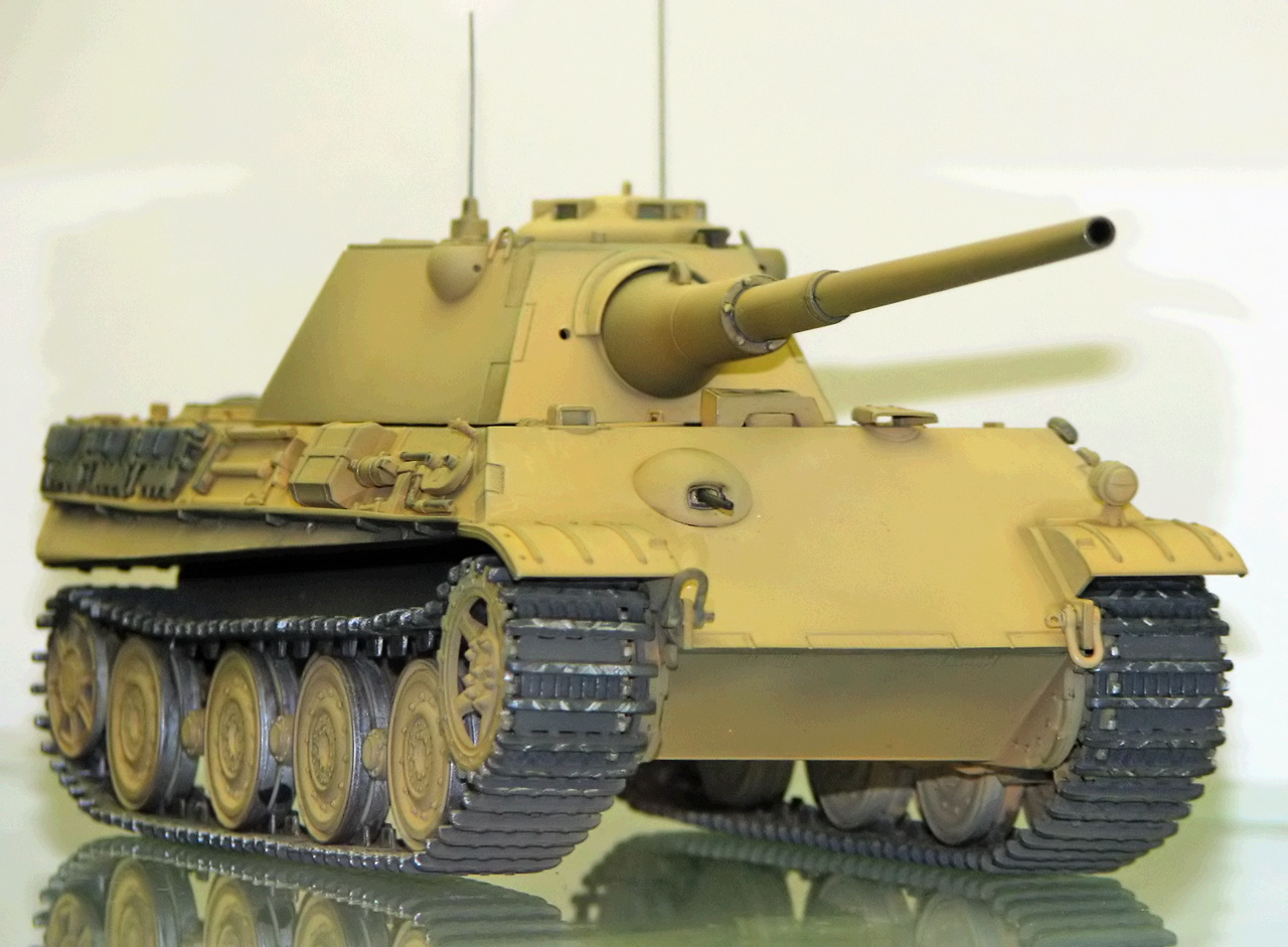 Dieses Bild zeigt ein Modell des Panzers VI "Panther" Ausf. F mit Schmalturm.